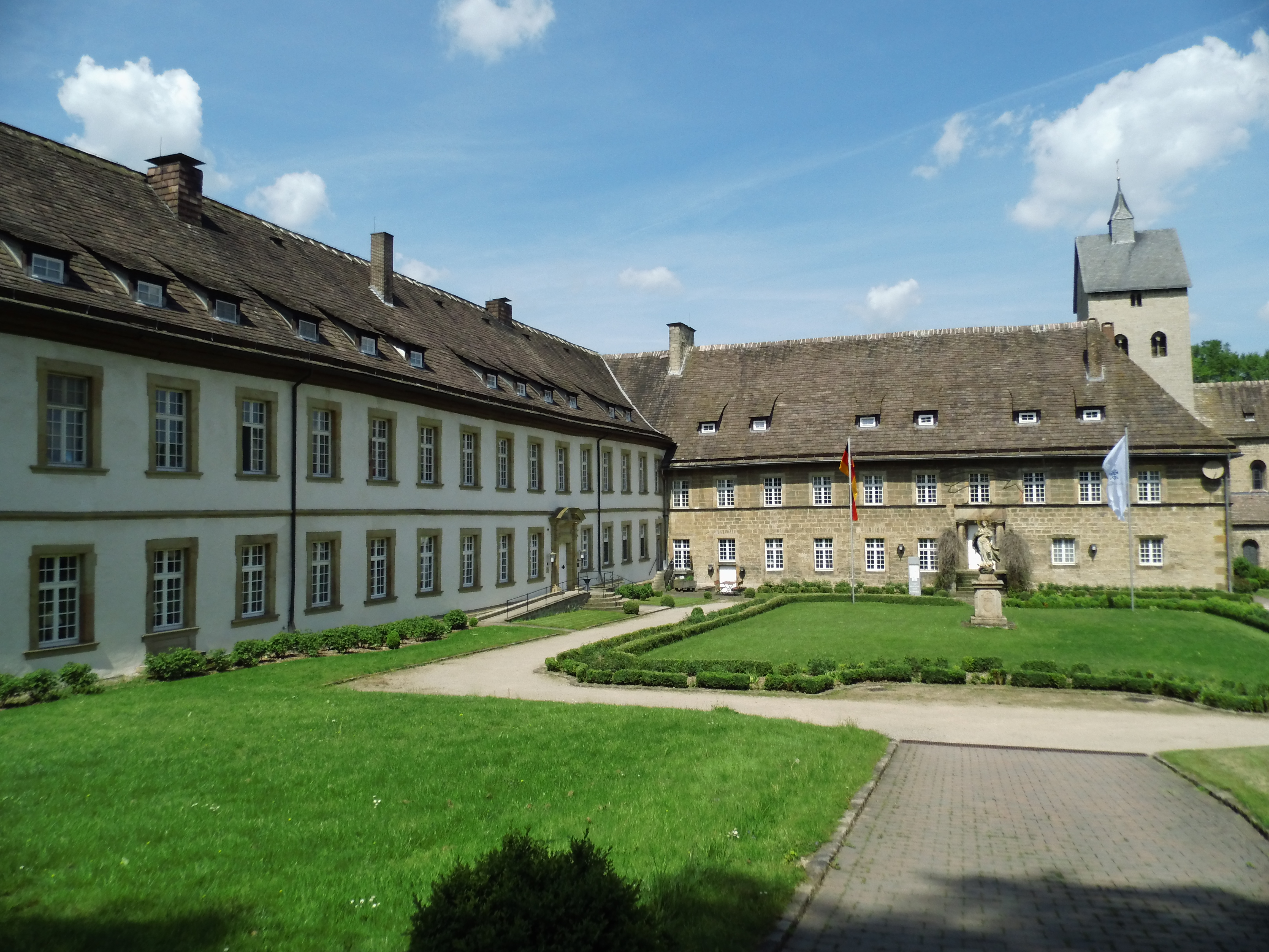 Baudenkmal, Liste der Baudenkmäler in Brakel Nr. 1